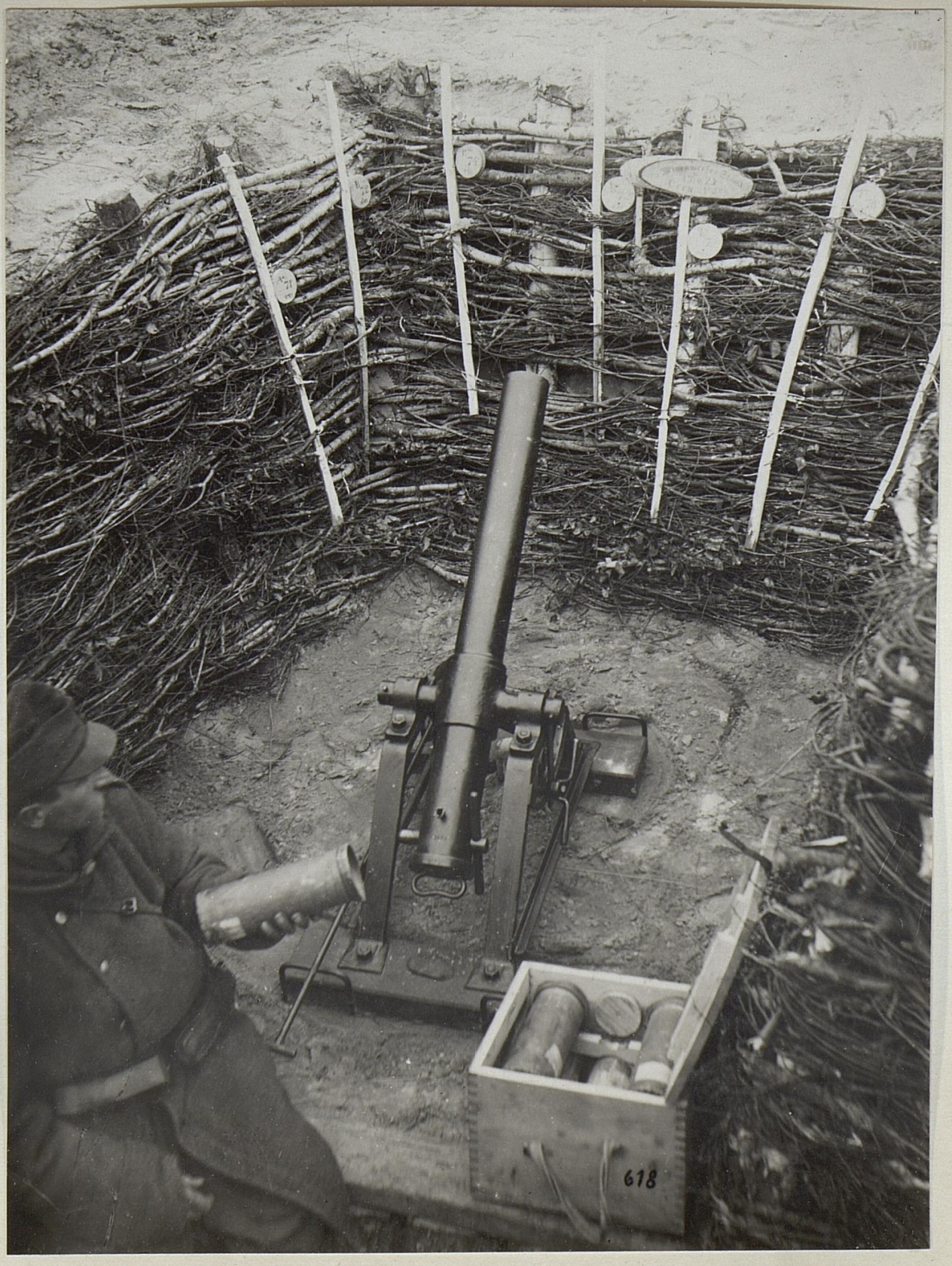 Kriegsalbum 95, Bild 28437